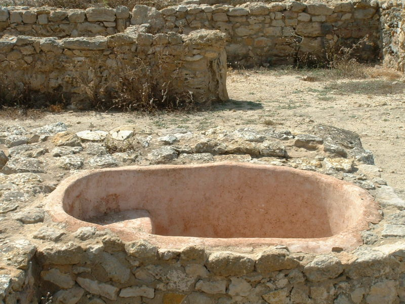 Photographie personnelle (Asram) prise en 2004 sur le site de Kerkouane en Tunisie; elle montre une baignoire-sabot couverte d'un enduit rouge